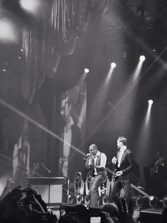 Justin Timberlake y Jay-Z interpretando «Suit & Tie», del álbum The 20/20 Experience, en el Hollywood Palladium el 10 de febrero de 2013.